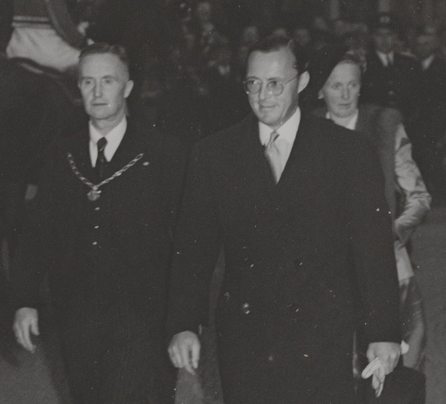 Collectie / Archief : Fotocollectie Elsevier Reportage / Serie : [ onbekend ] Beschrijving : Koningin Juliana en prins Bernhard begeven zich van het stadhuis naar de aubade door de Zwolse schoolkinderen op het Grote Kerkplein. Links de burgemeester van Zwolle, jhr. mr. G.A. Strick van Linschoten, rechts de Commissaris van de Koningin in Overijssel, Ir. J.B.G.M. ridder de van der Schueren Datum : 12 oktober 1949 Locatie : Overijssel, Zwolle Trefwoorden : bezoeken, burgemeesters, koninginnen, koninklijk huis, prinsen Persoonsnaam : Bernhard, prins, Juliana, koningin, Schueren J. B. G M. de van der, Strick van Linschoten G. A van Fotograaf : Noske, J.D. / Anefo Auteursrechthebbende : Nationaal Archief Materiaalsoort : Foto (zwart/wit) Nummer archiefinventaris : bekijk toegang 2.24.05.02 Bestanddeelnummer : 021-0351